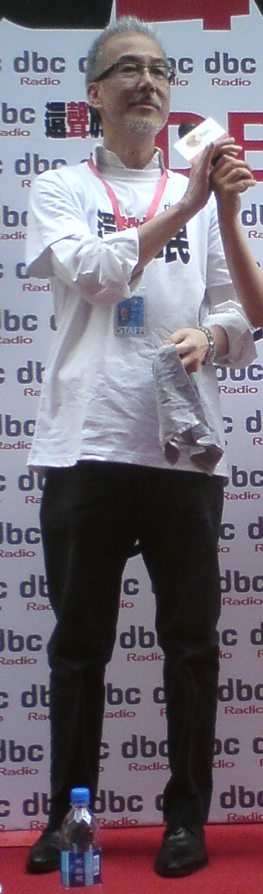 黃偉民於2012年71大遊行